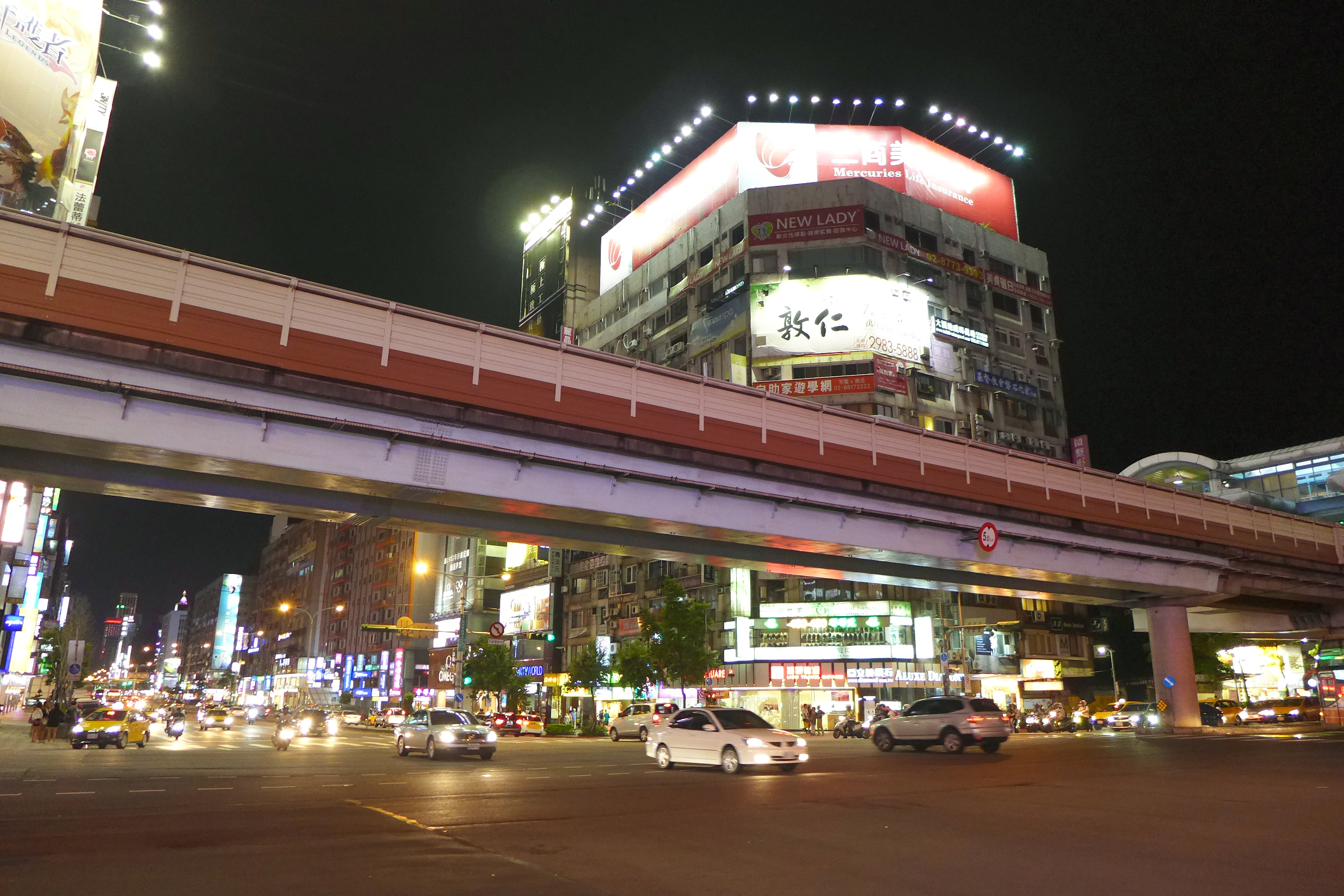 忠孝東路三段